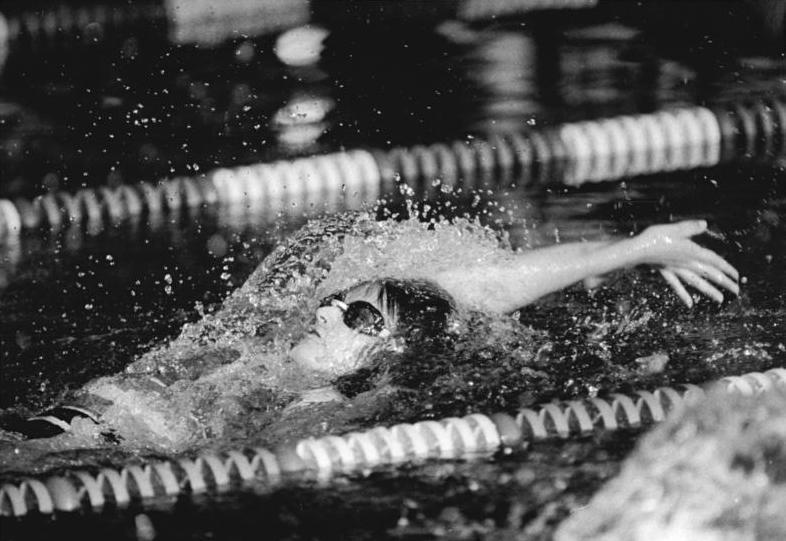 Anja Eichhorst ADN-ZB Oberst 18.12.88 Berlin: 7. Sprintpokal im Sportschwimmen- in der 50-Meter-Rückenentscheidung der Damen siegte Anja Eichhorst vom SC Empor Rostock in 29,94 sec. Bei dem traditionellen Meetind war der größte Teil der Olympiateilnehmer noch nicht am Start.